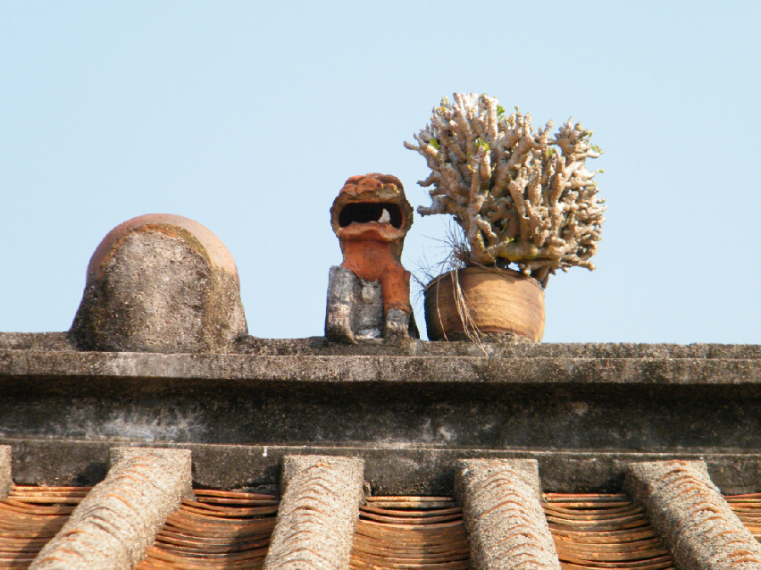 中文（中国大陆）: 广东省汕头市达濠老厝厝顶的风狮